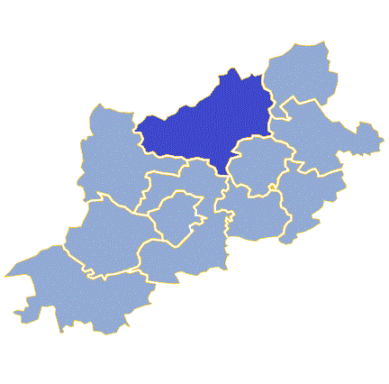 Powiat zielonogórski - Gmina Sulechów